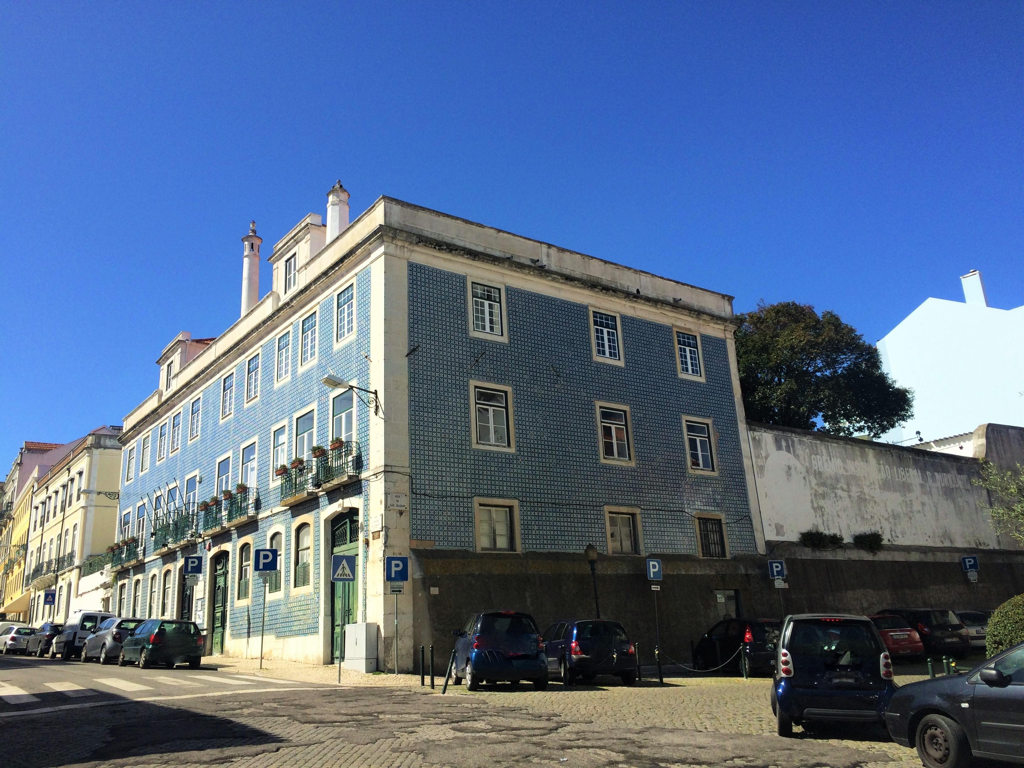 Palacete do Visconde de Ferreira de Lima, atualmente Junta de Freguesia de Campo de Ourique - Secção Santa Isabel